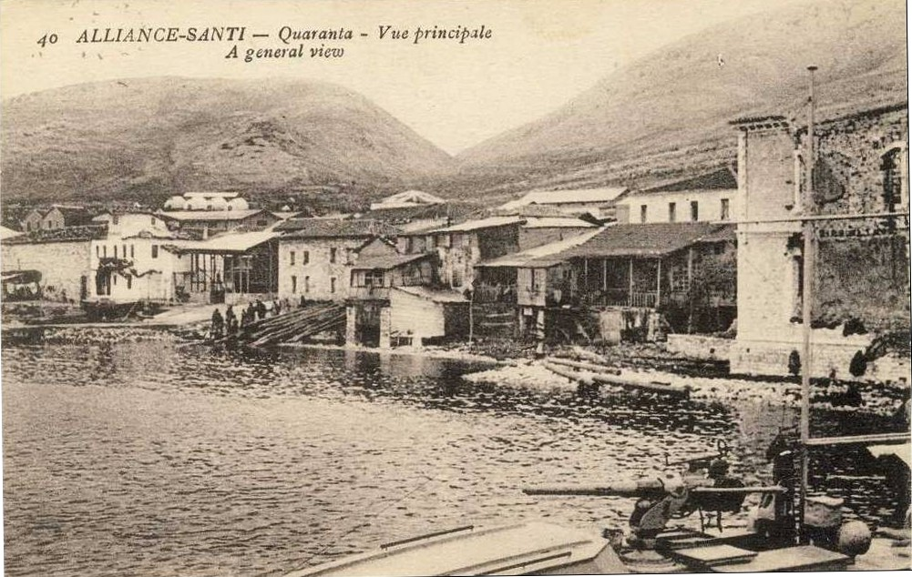 Santi-Quaranta (Sarandë ou Saranda, en Albanie) - vue générale - vers 1918